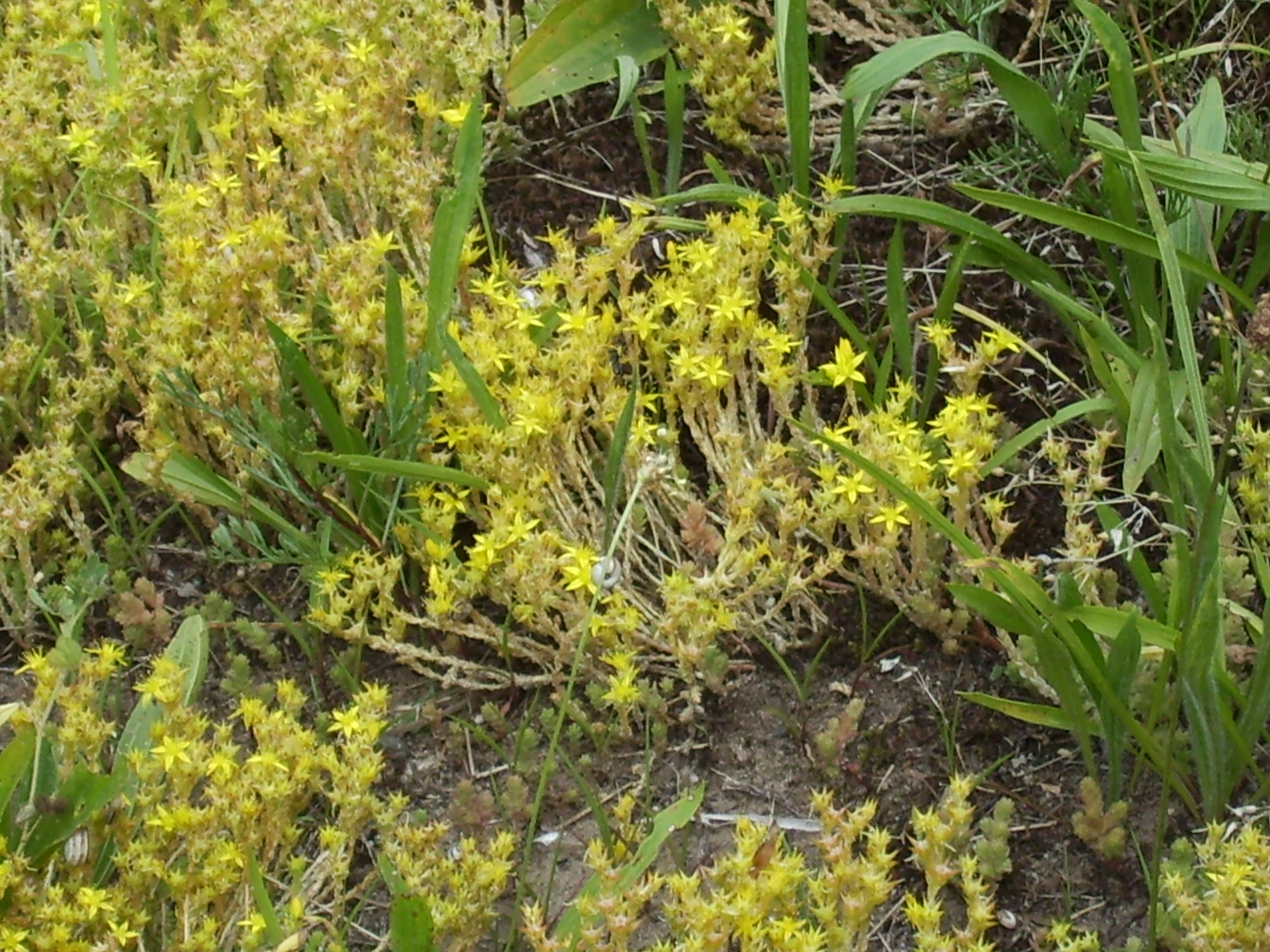 NSG Sandhausener Duenen (NSG 2014), Teilgebiet Pferdstrieb, Mauerpfeffer